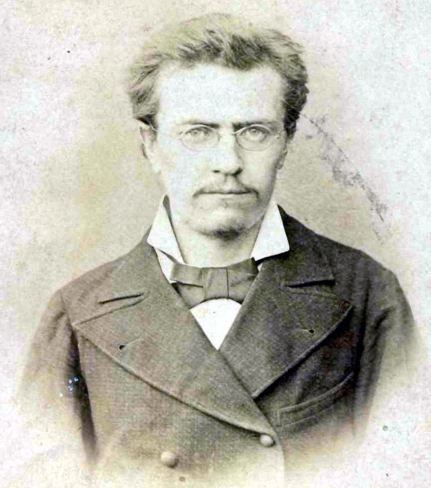 Скан фотографии, сделанной 18.05.1881 в Мценске, в ожидании этапа на каторгу и отправленной сестре, Марии Тимофеевне Кондратенко, с надписью "Сейте разумное, доброе, вечное, Сейте, вам скажет спасибо сердечное русский народ!" (Хранится в семейном архиве)